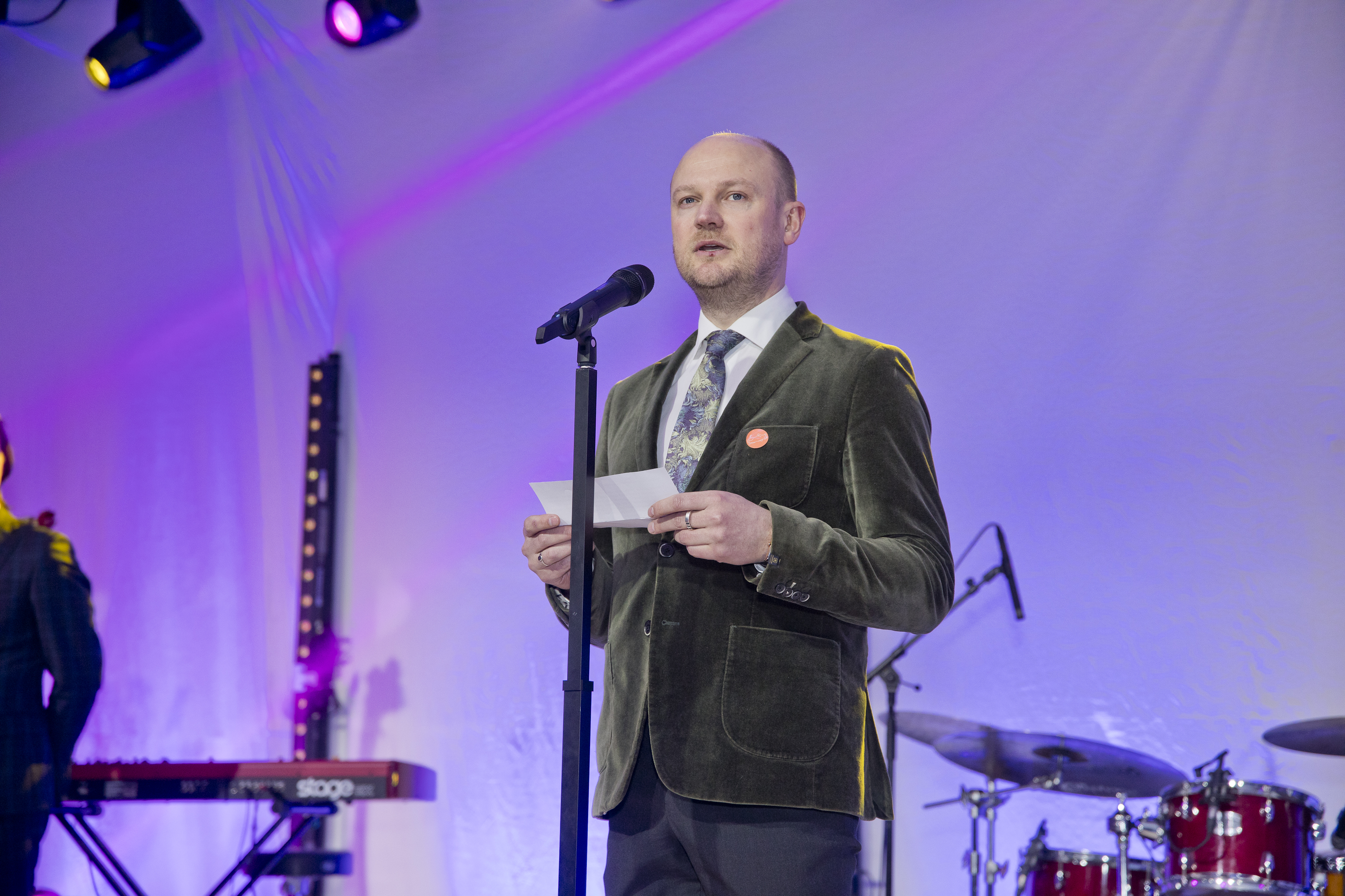 Siim Raie, muinsuskaitseameti peadirektor